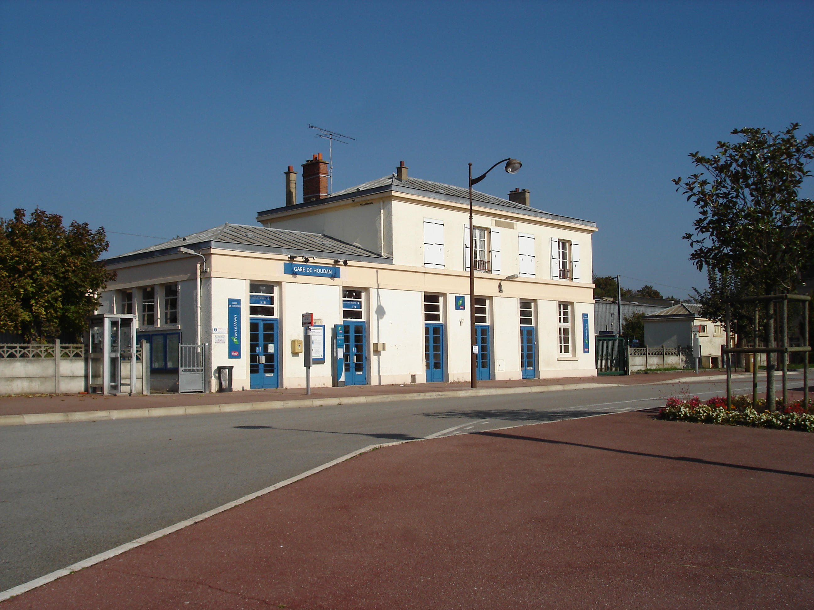 Gare de Houdan (78) : Le bâtiment voyageurs.